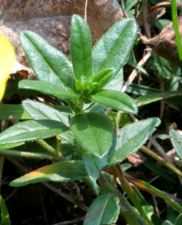 Helianthemum_nummularium (Eliantemo maggiore) Località : Barp (BL), 700 m s.l.m.